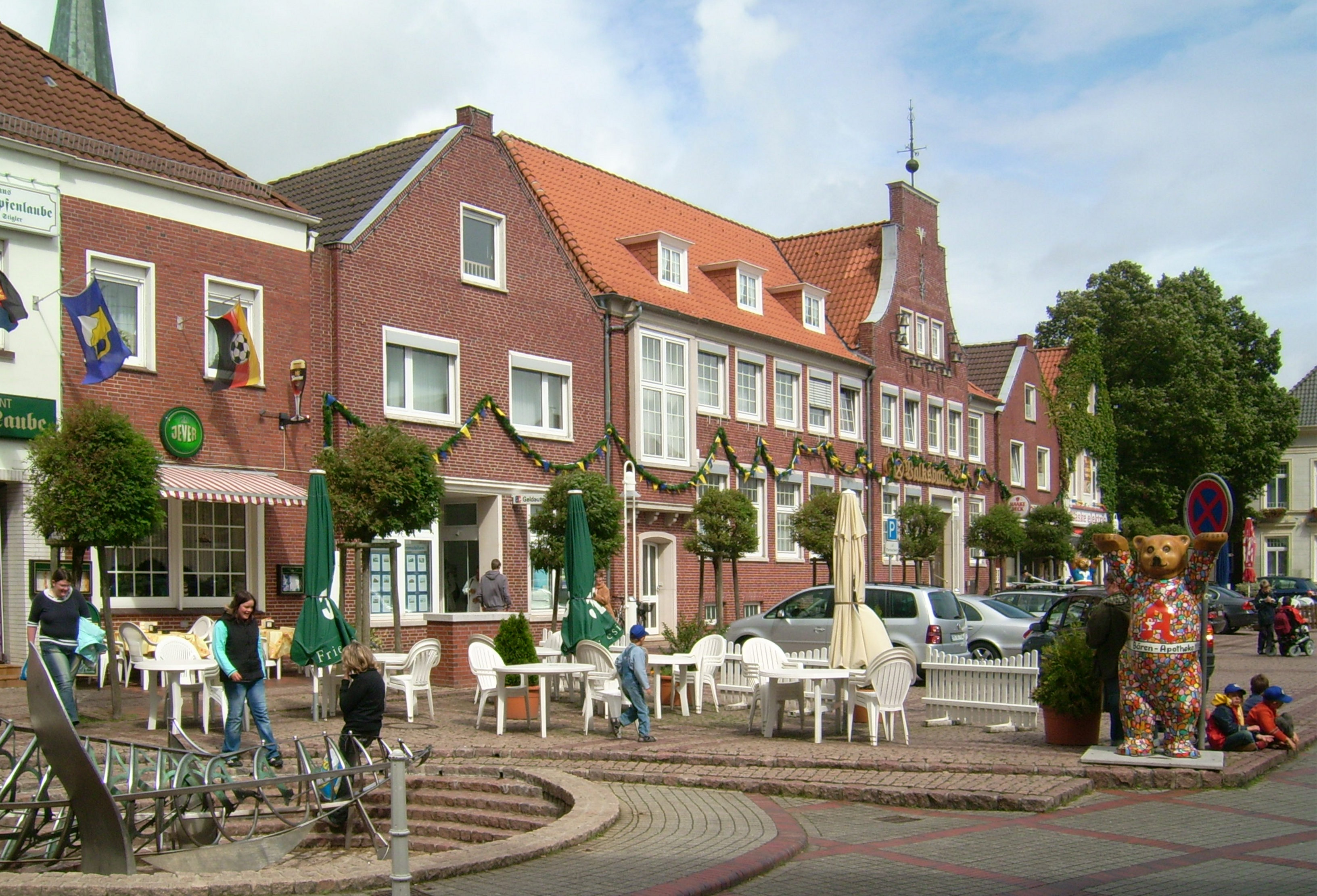 In Esens